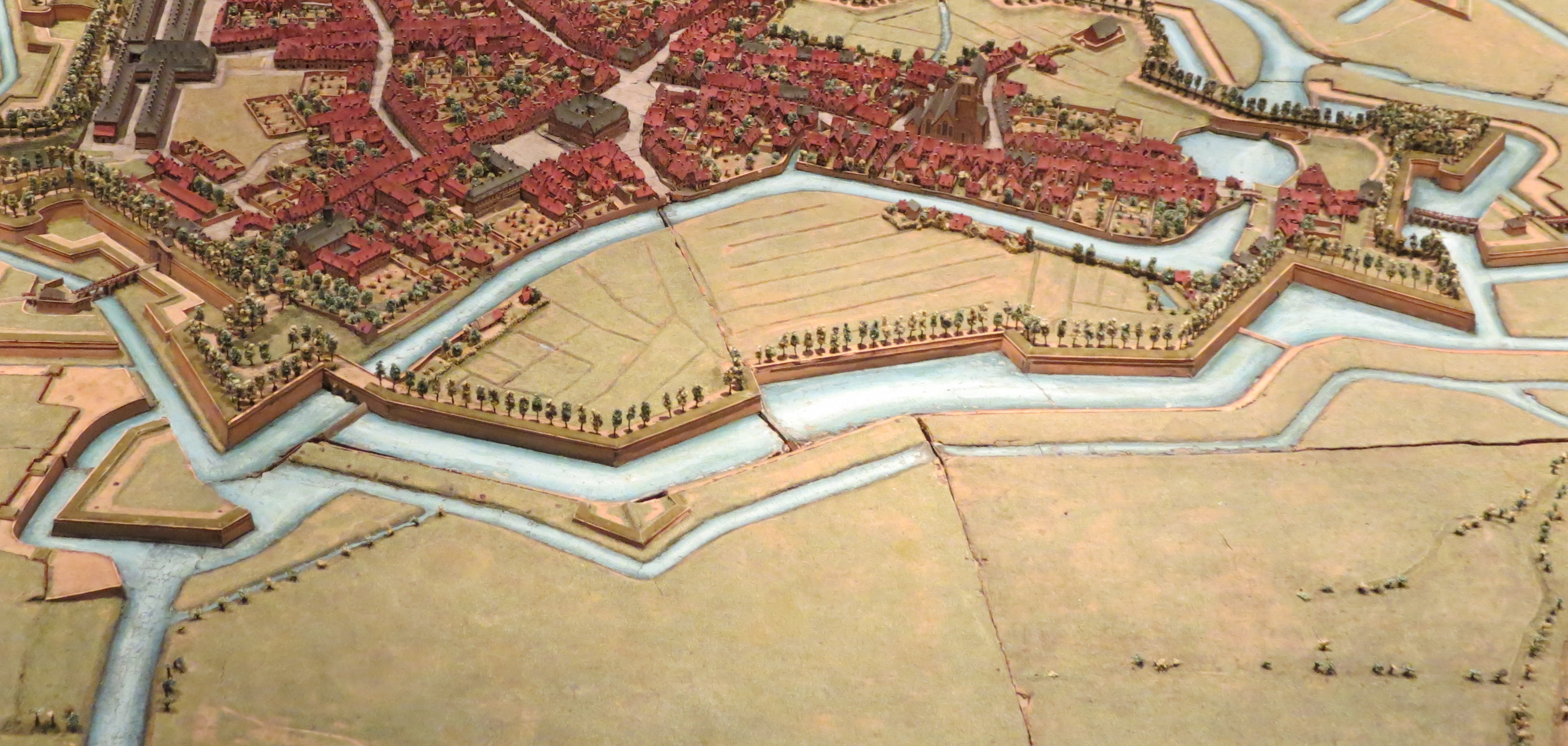 Plan Relief 11 Menin 2 PBA Lille 2019